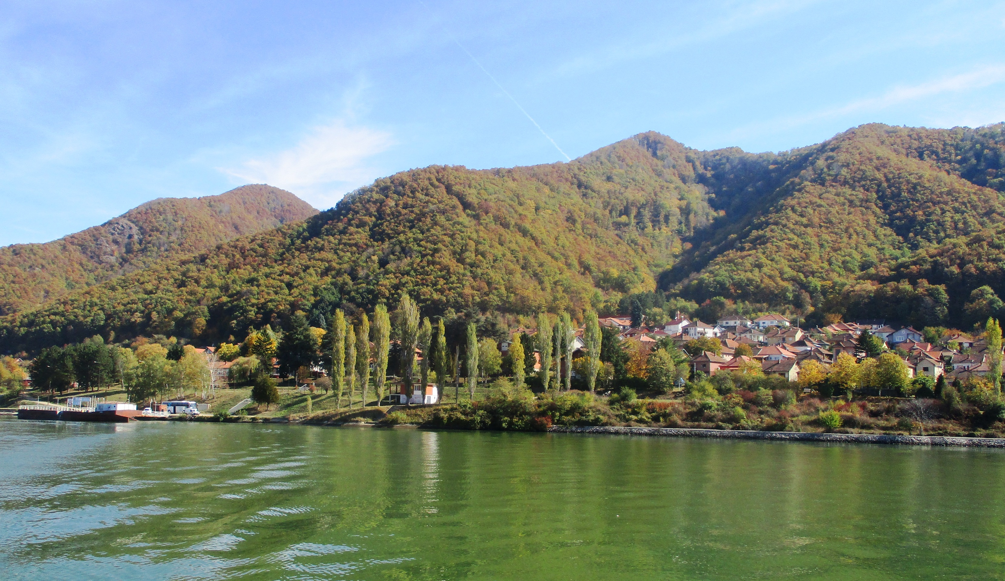 Село Текија, општина Кладово, Ђердапска клисура, Србија Tekija Village, Kladovo Municipality, Iron Gate Gorge, Serbia